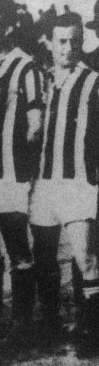 Il calciatore italiano Giuseppe Grabbi alla Juventus nella stagione 1920-21.